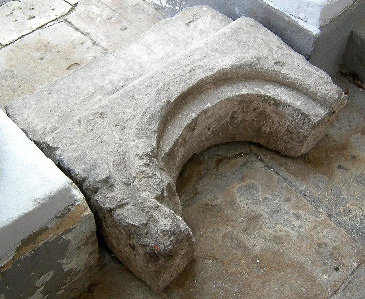 Фрагмент Высоцкой башни Серпуховского кремля Фрагмент Высоцкой башни Серпуховского кремля, обнаруженный при раскопках в 2006 году